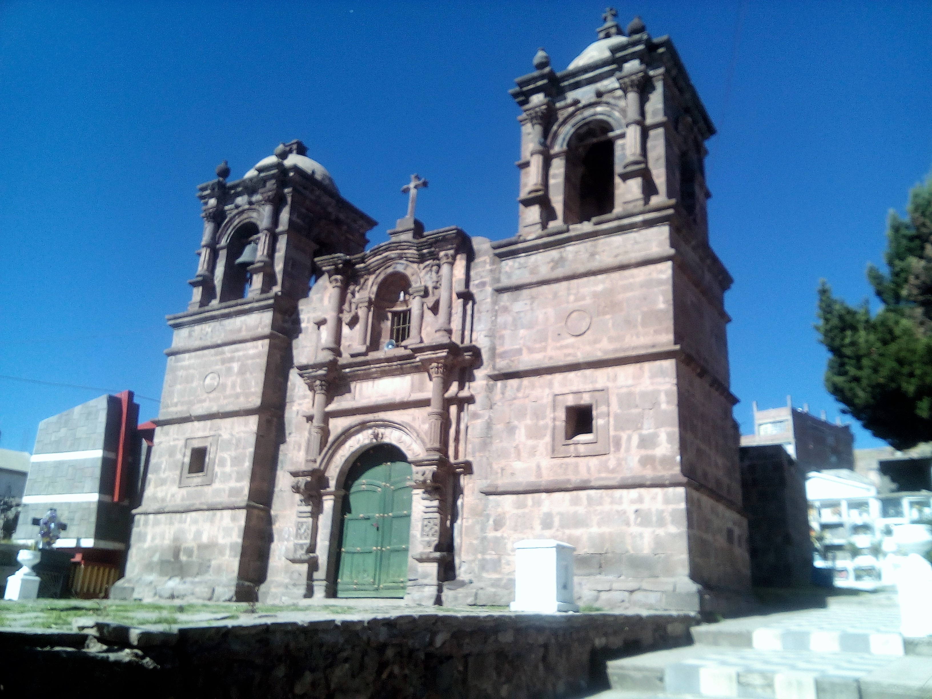 Hermosa estructura colonial que se mantiene intacta hasta la actualidad